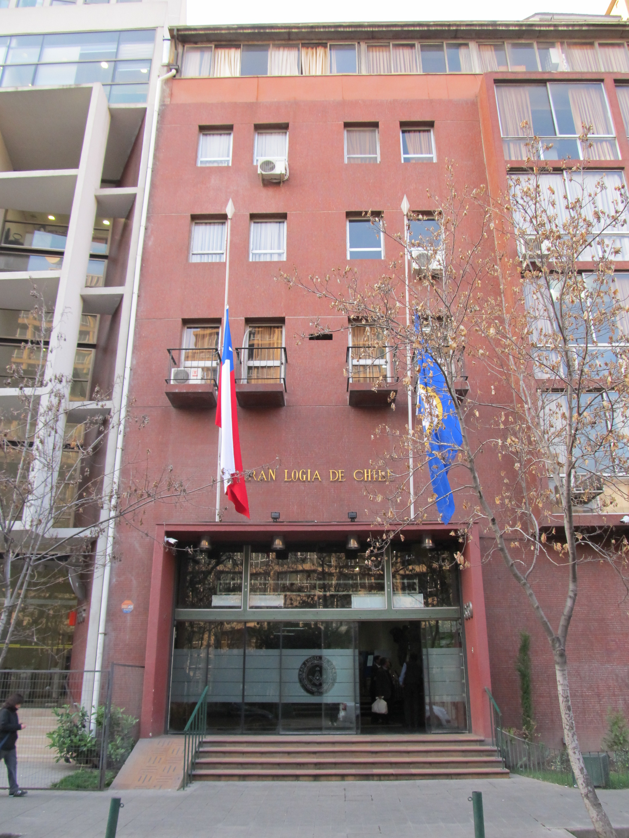 Sede de la Gran Logia de Chile, Santiago de Chile.